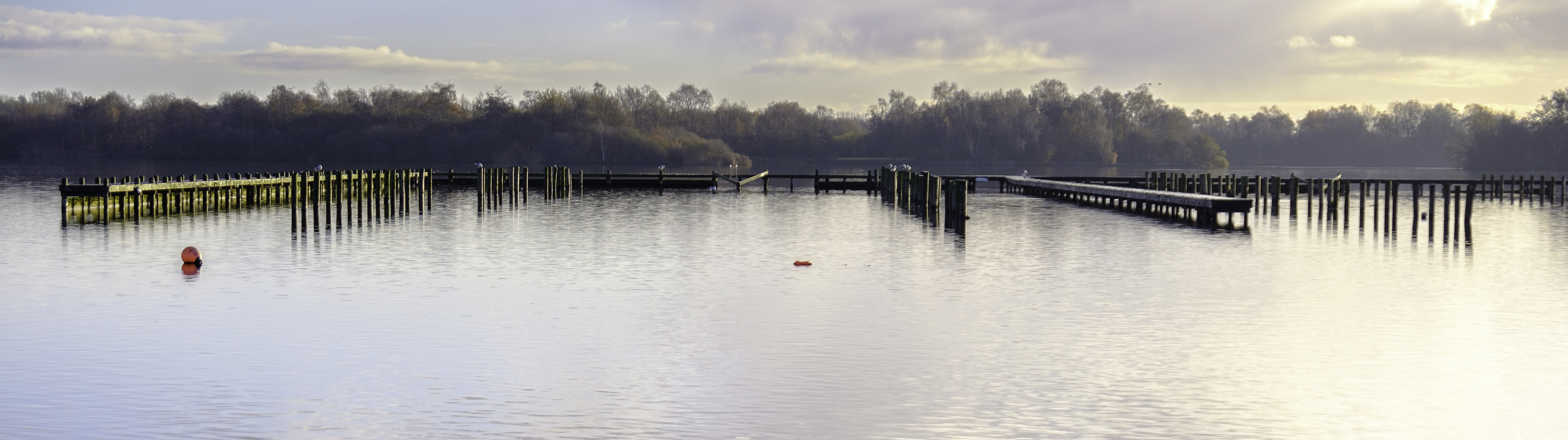 Steigers aan het Hoornsemeer